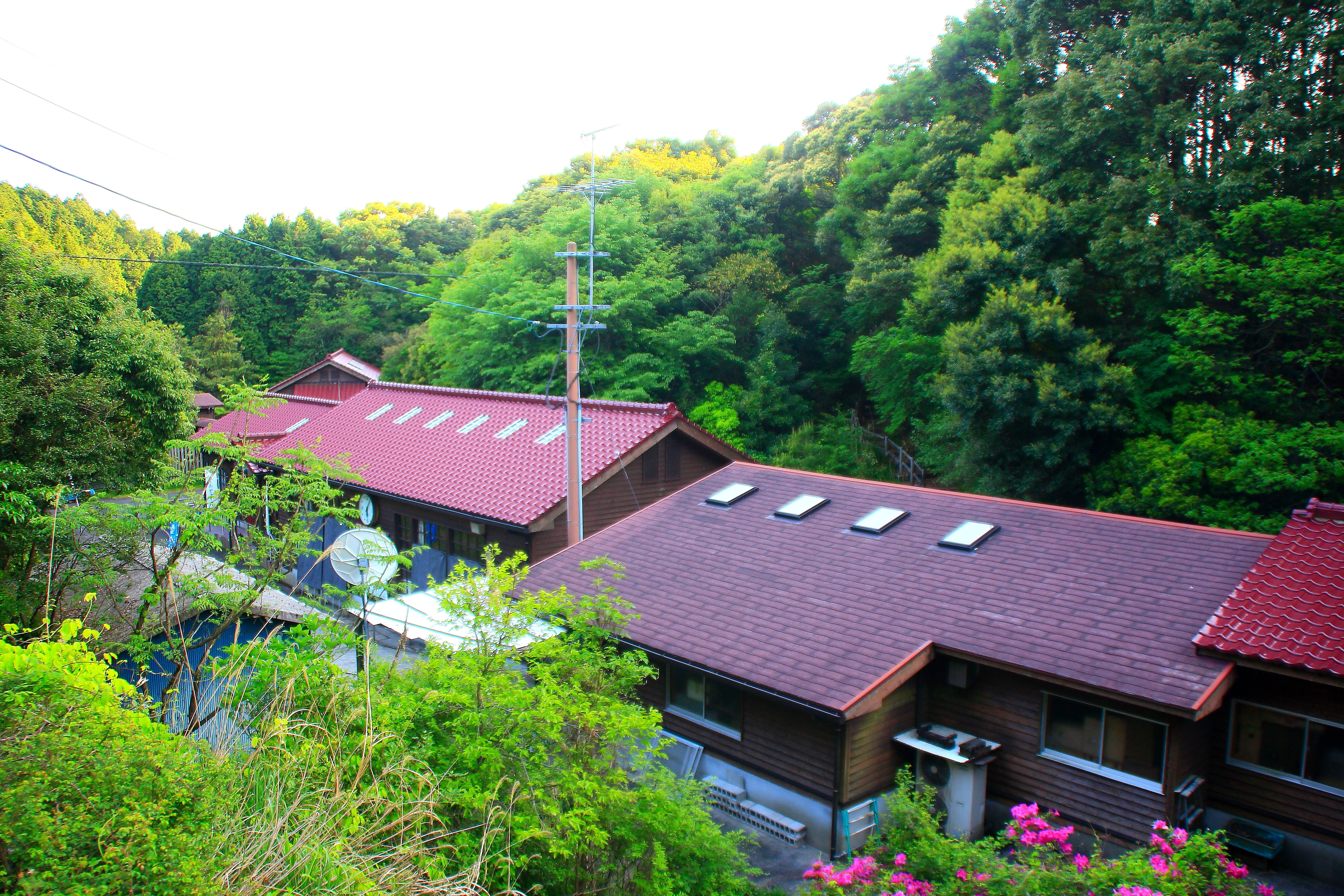 西海市大瀬戸にあるレコード博物館